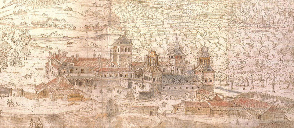 Dibujo del desaparecido Palacio de Valsaín del pueblo de Real Sitio de San Ildefonso hecha por Anton van der Wyngaerde en 1562